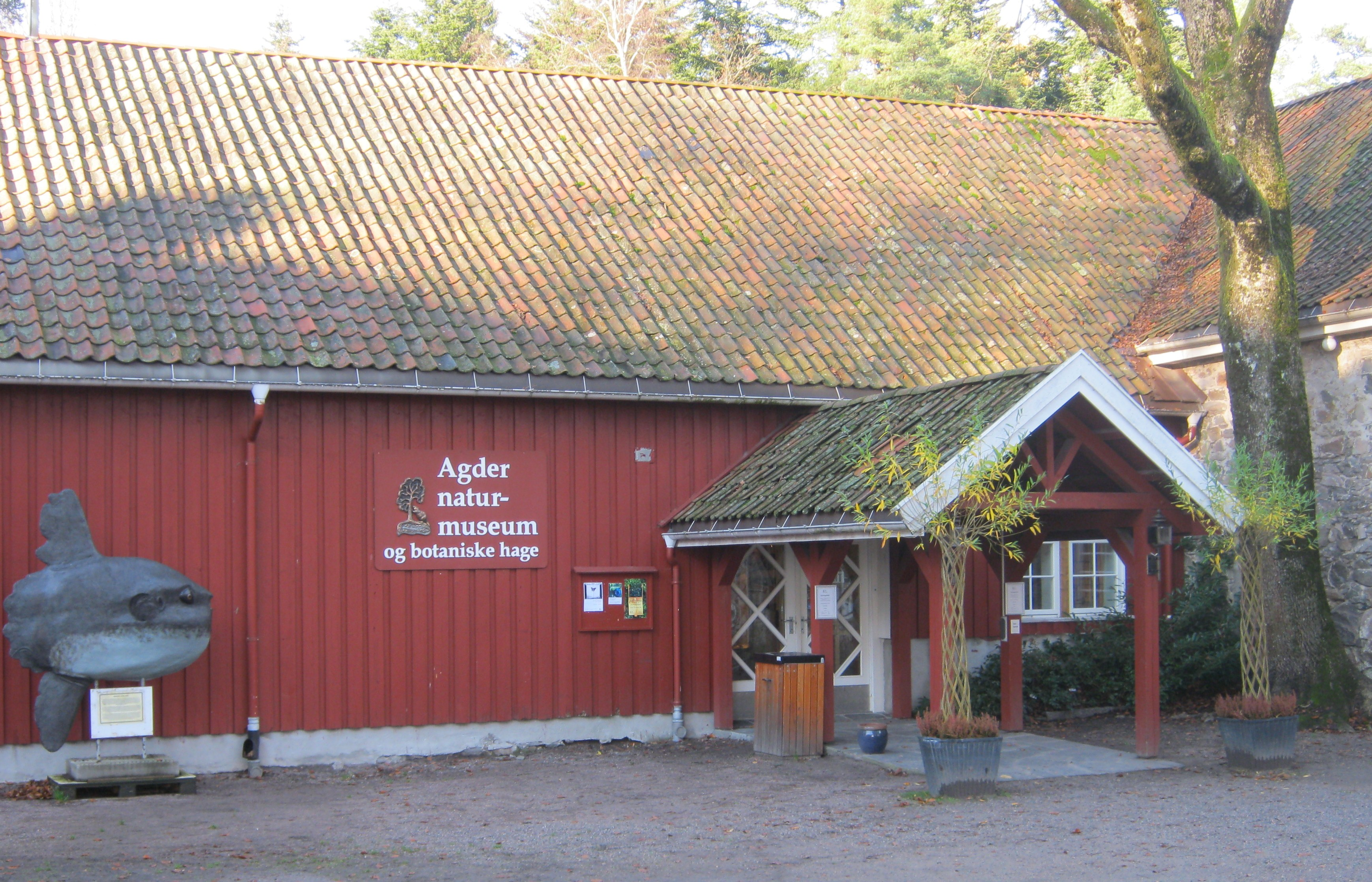 Agder naturmuseum og botaniske hage, museumsinngang